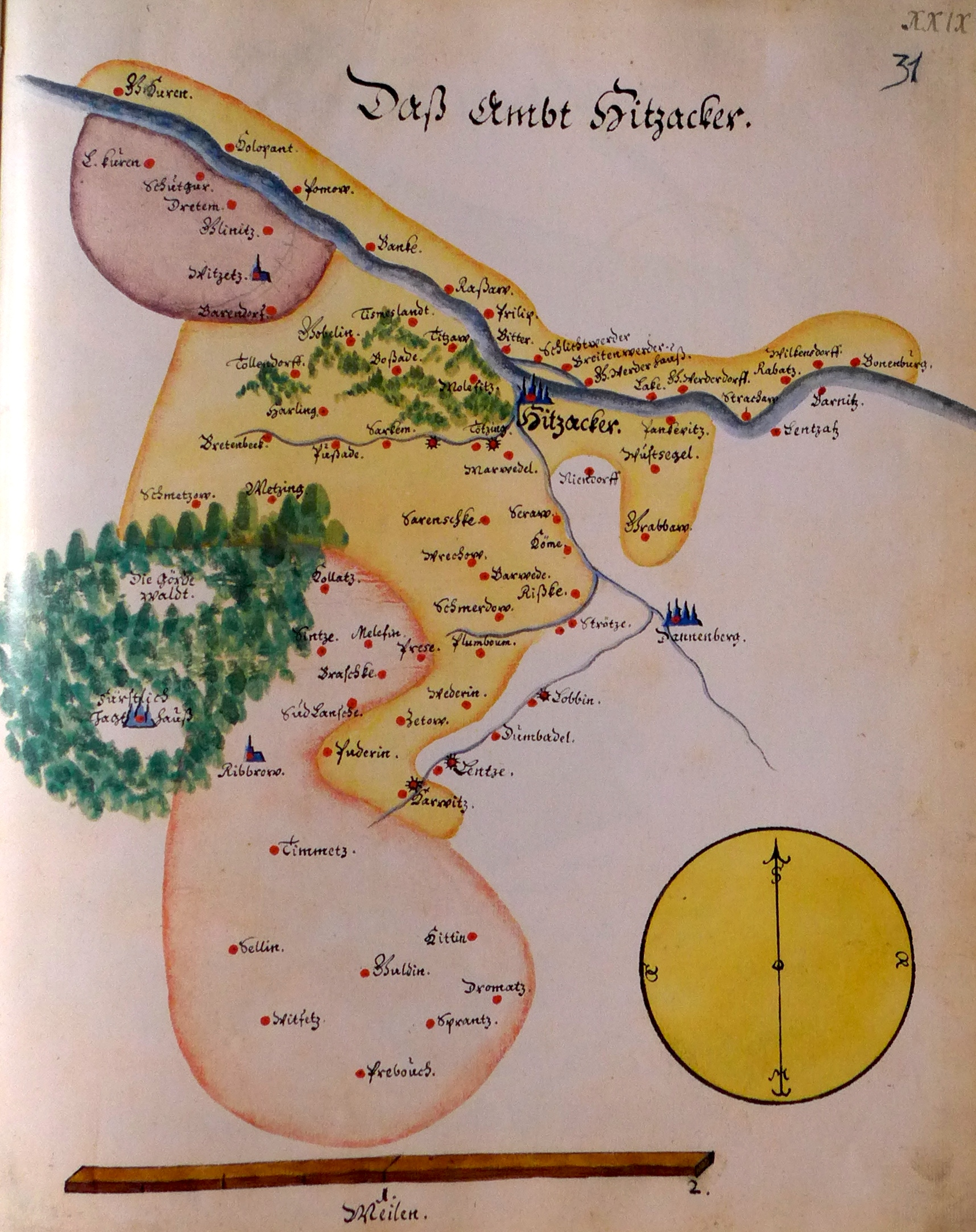 Ämteratlas des Fürstentums Lüneburg von Johannes Mellinger, um 1600 – Reproduktion der im Niedersächsischen Landesarchiv, Abteilung Hannover, lagernden Kopie um 1678 (vgl.